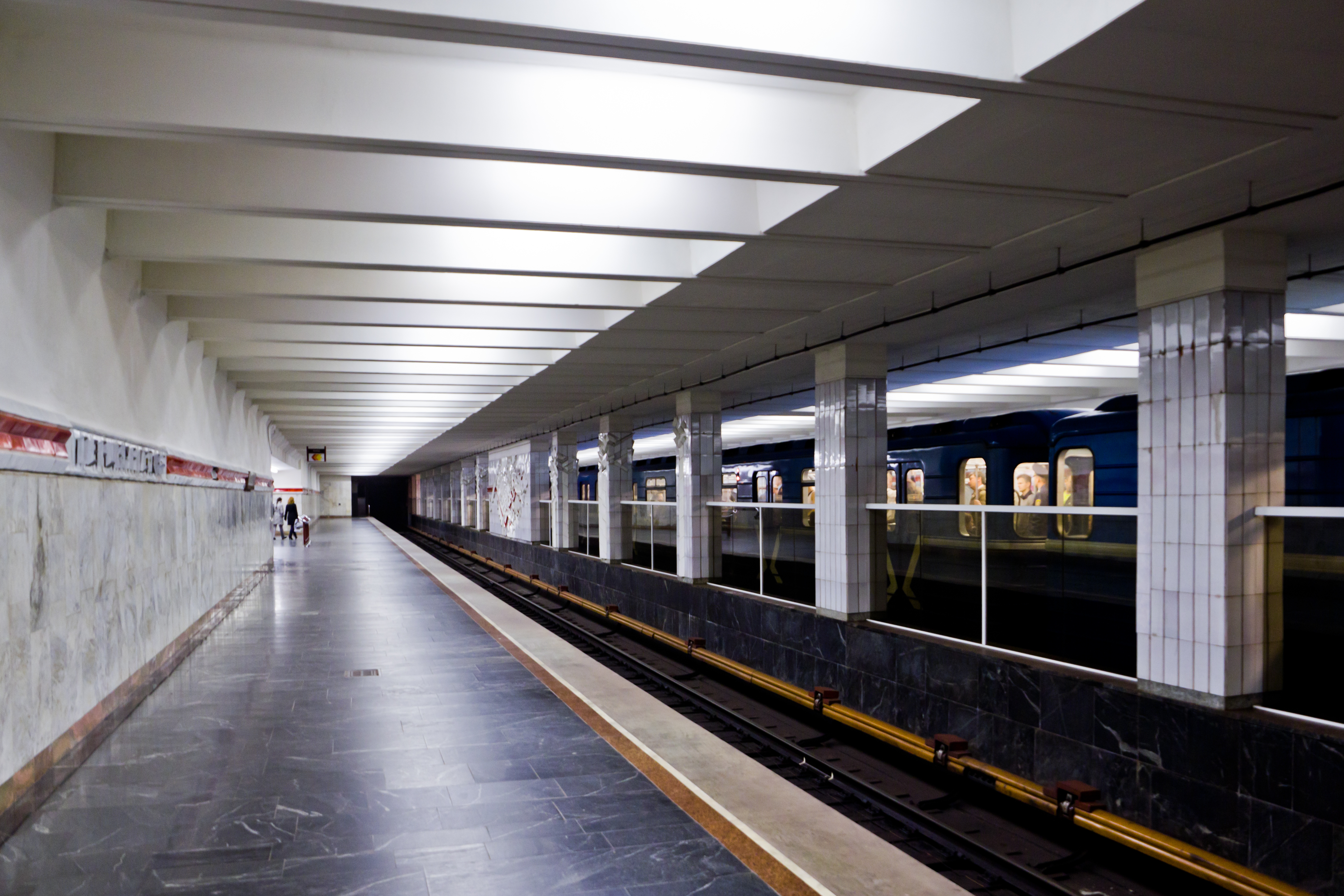 Станция метро «Первомайская», Минск